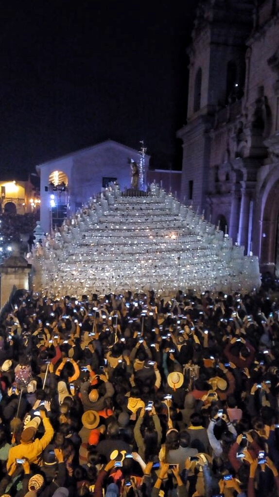 Résurrection ayacucho